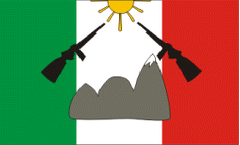 Bandera del Movimiento Armado Quintin Lame, guerrilla indígena que opero en el Cauca hasta 1991.